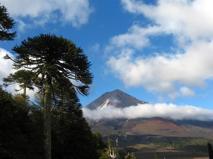 © Pablo Bravo Monasterio